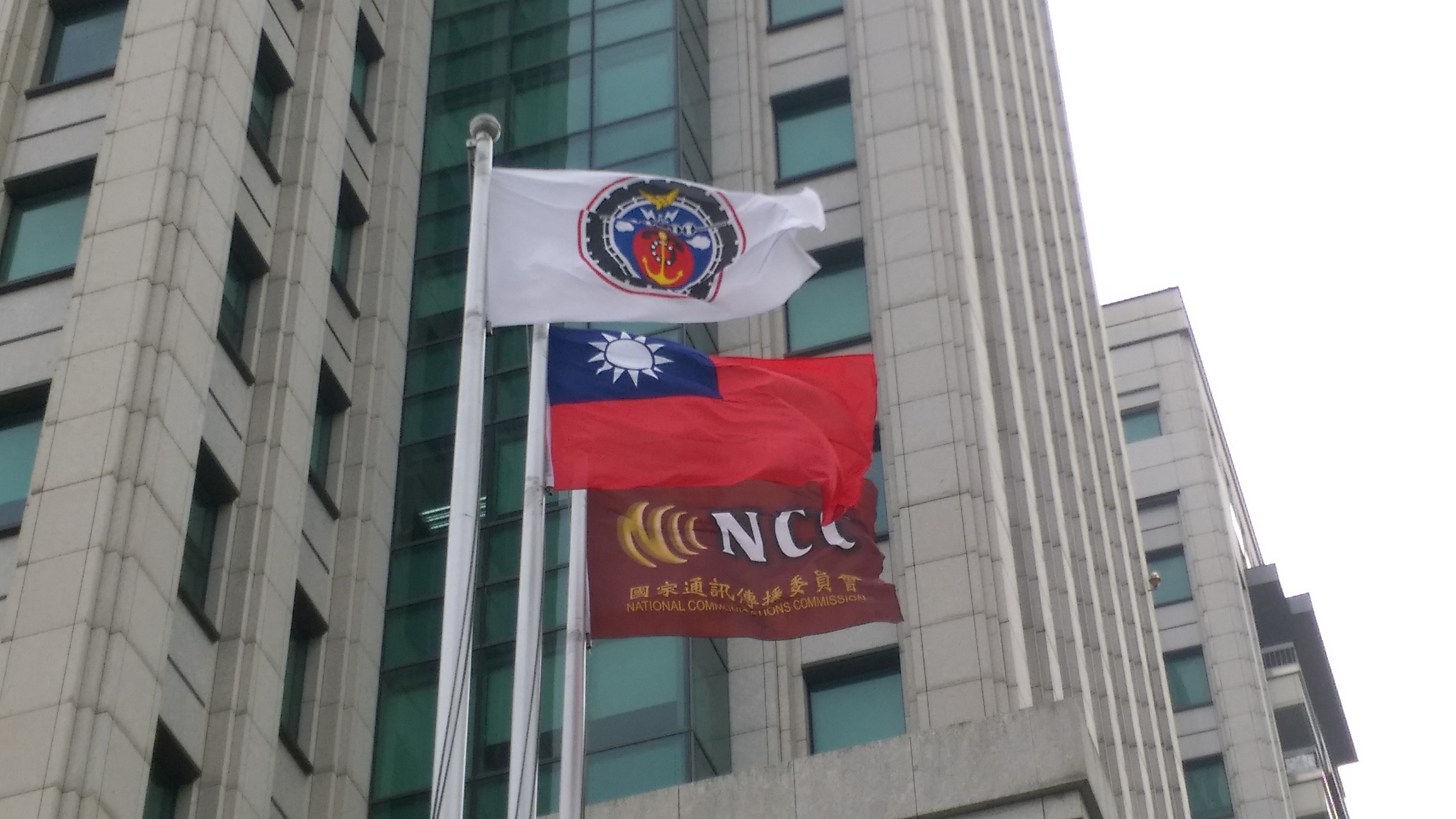 交通通訊傳播大樓前懸掛的中華民國國旗(中)、交通部部旗(前)、國家通訊傳播委員會會旗(後)。